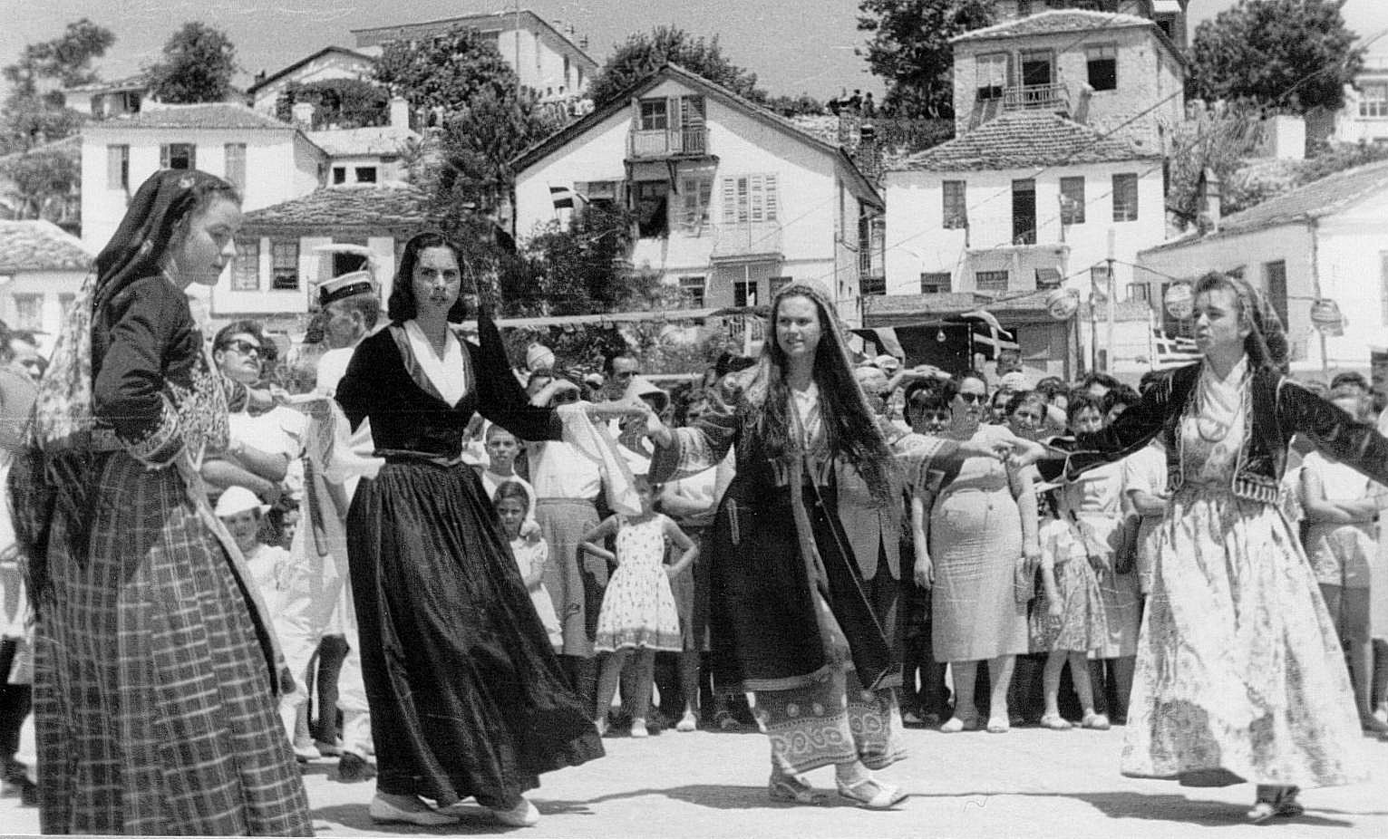 Schwimmfest 1958, Tanz der Frauen